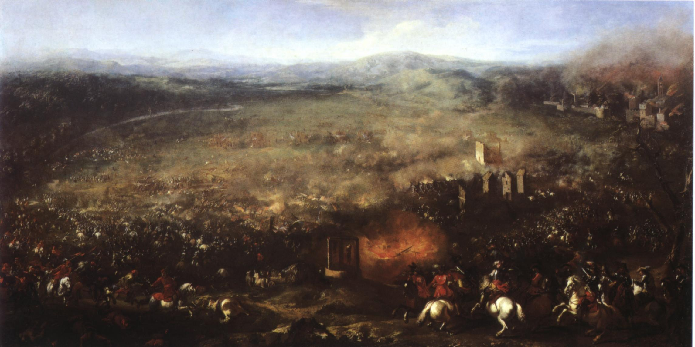 Jacques Courtois: Die Schlacht bei Lützen 1632